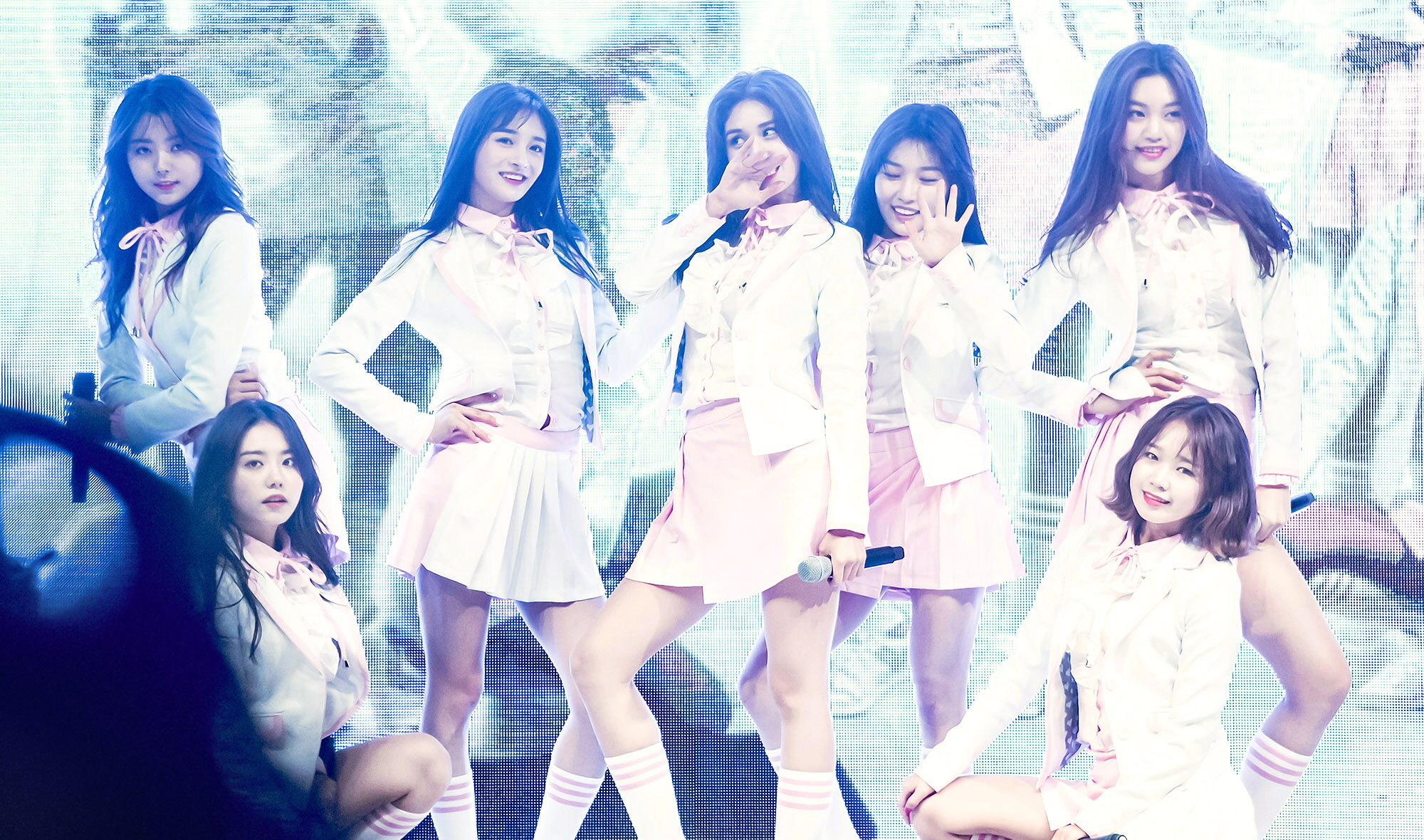 161219 불빛거리 출정식 아이오아이 직찍 업로드